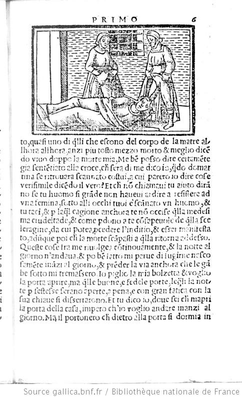 Titre : [Illustrations de Apuleo vulgare dell'Asino d'oro] / [Non identifié] ; Lucio Apulée, aut. du texte Date d'édition : 1537 Sujet : Apulée (0125-0180?). Métamorphoses Type : Figures allégoriques,image fixe Langue : Italien Format : 68 est. : gravures sur bois : N. et b. ; 13 x 8,3 cm et moins Format : image/jpeg Droits : domaine public Identifiant : ark:/12148/btv1b22000114 Source : Bibliothèque nationale de France Relation : Provenance : bnf.fr Date de mise en ligne : 15/10/2007